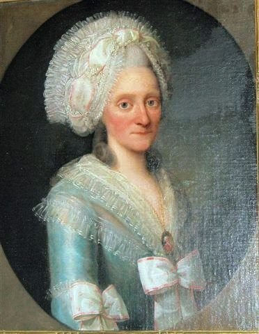 Datter av skipsreder Zacharias Simonsen Wesseltoft. Gift med skipsreder Niels Carlsen. Mor til blant andre Jacobine Ziegler (født Carlsen).